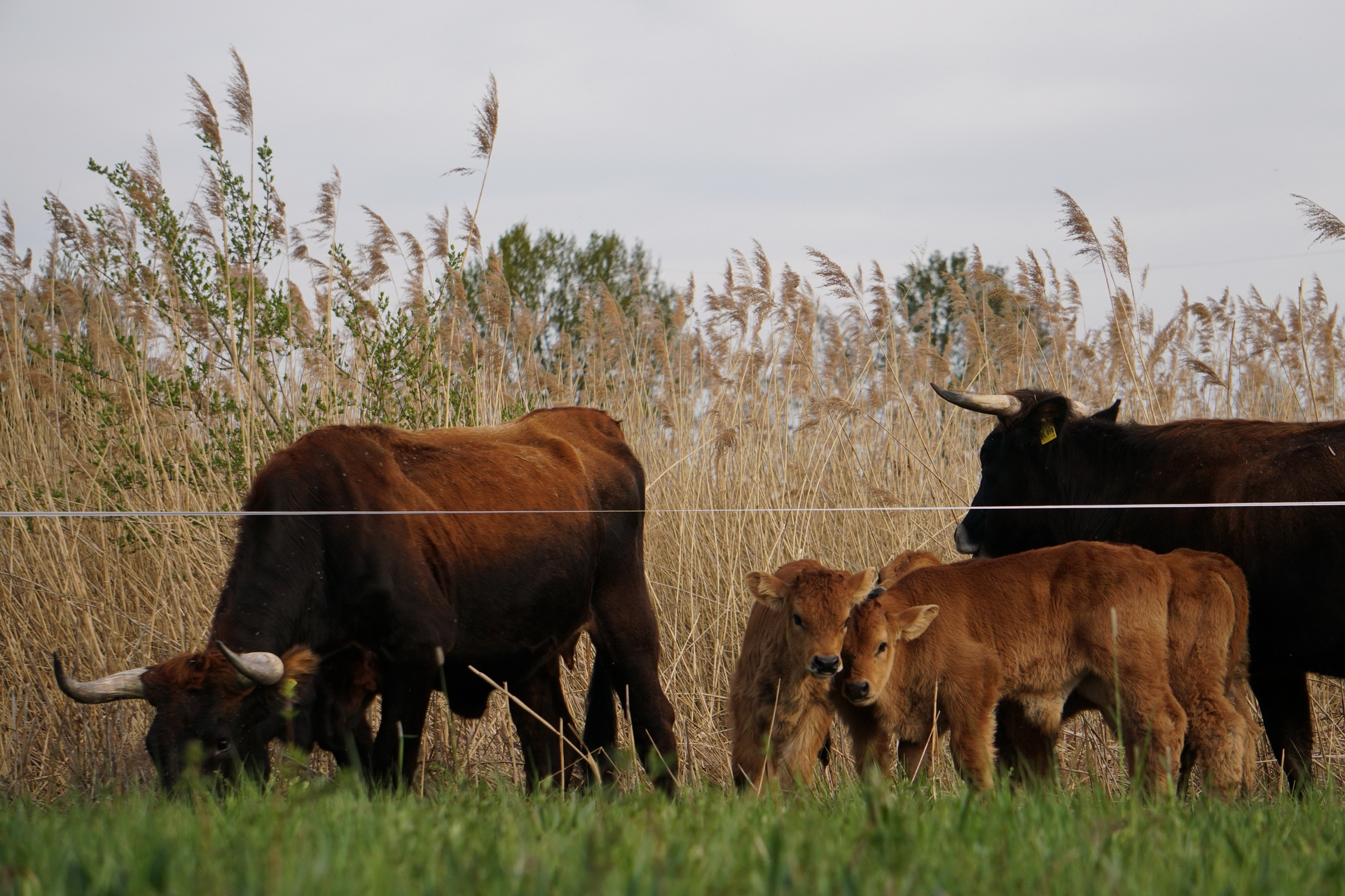 Heck-Rinder im Naturschutzgebiet „Hässeler Weiher von Neuenhaßlau“ (NSG 1435003)